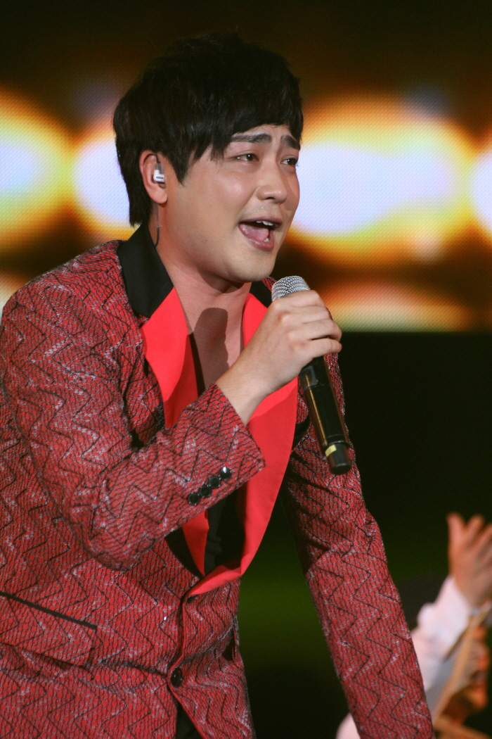 가수 박현빈